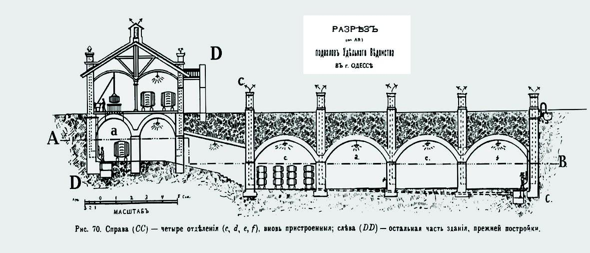 Креслення винних підвалів Франсуа Нуво на момент покупки підприємства департаментом Удільного виноробства (з журналу «Вісник Виноробства», який видавався Василем Таїровим.